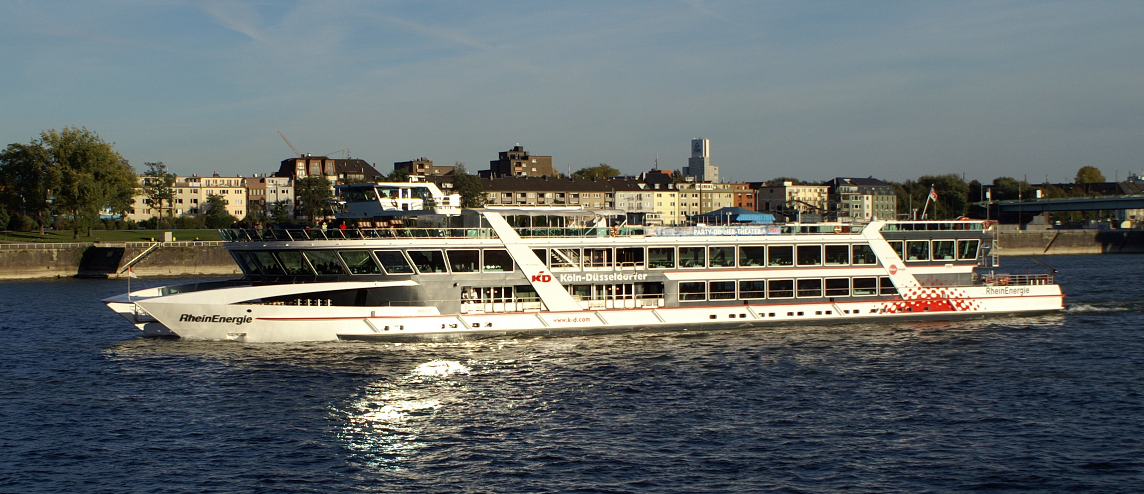 Die RheinEnergie in voller Fahrt kurz hinter der Severinsbrücke in Köln.